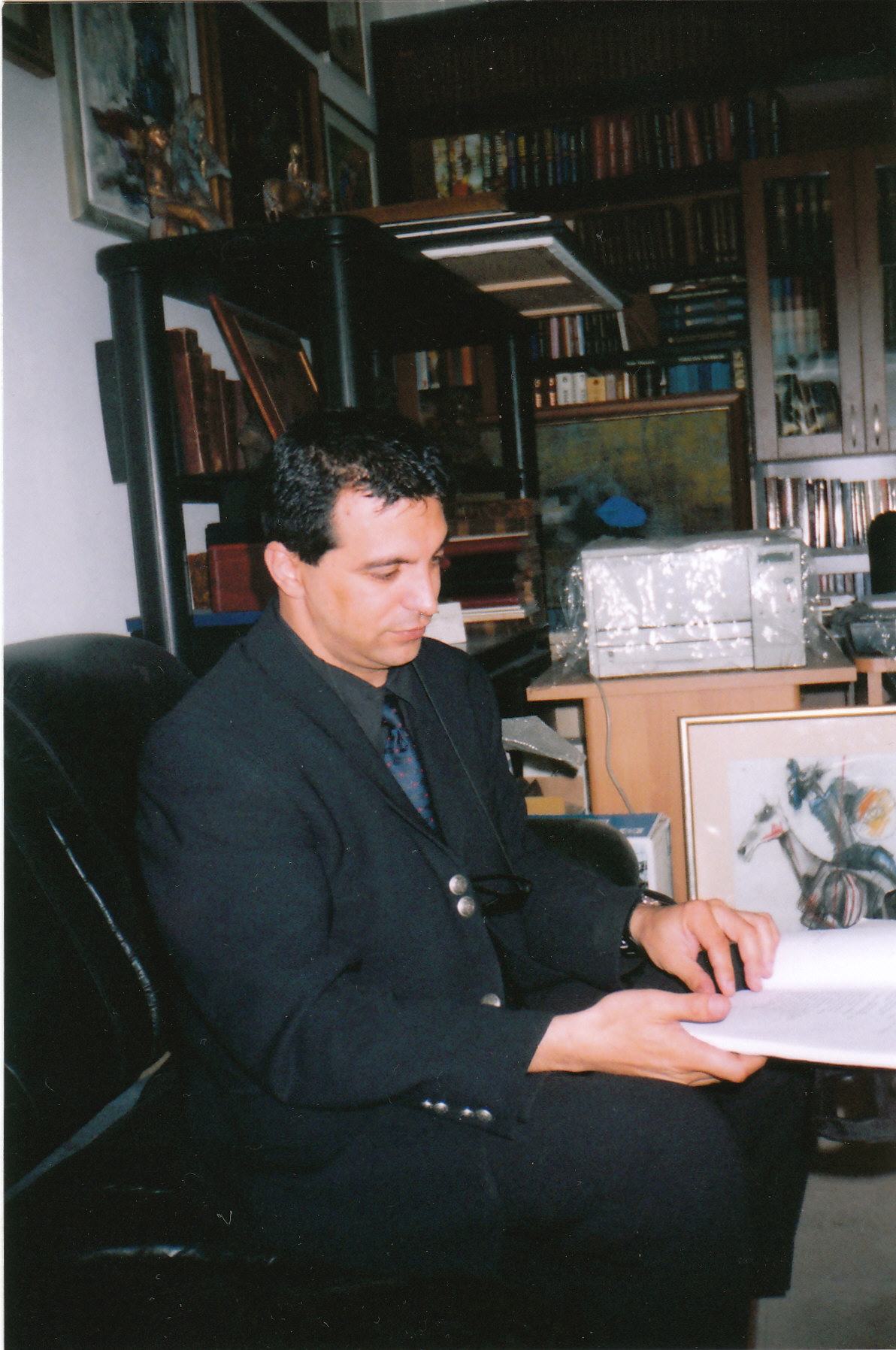 Снимка на поета Валери Иванов. Лиценз Автор на изображението: Ива Иванова, Валери Иванов